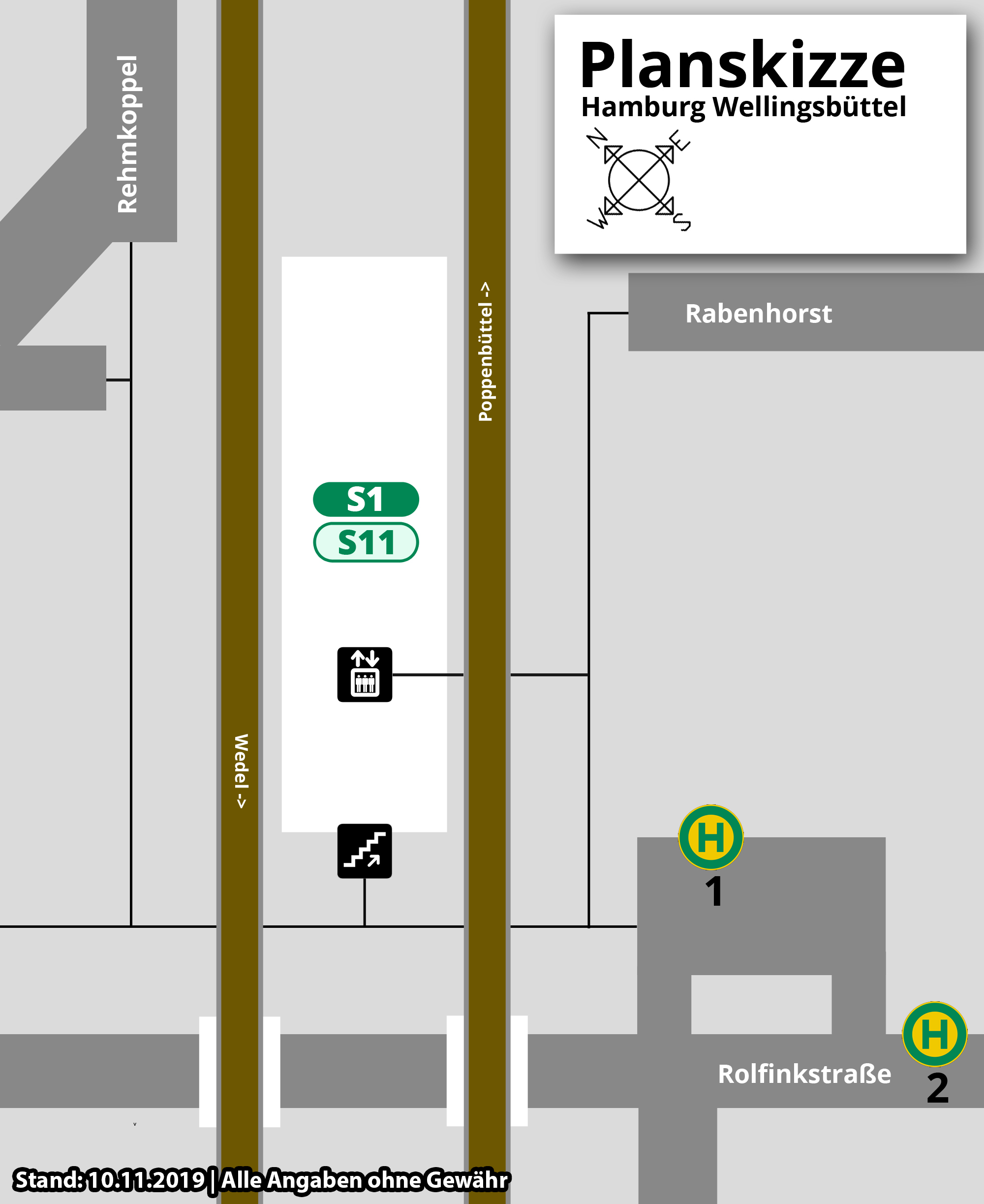 Planskizze für den Bahnhof Wellingsbüttel